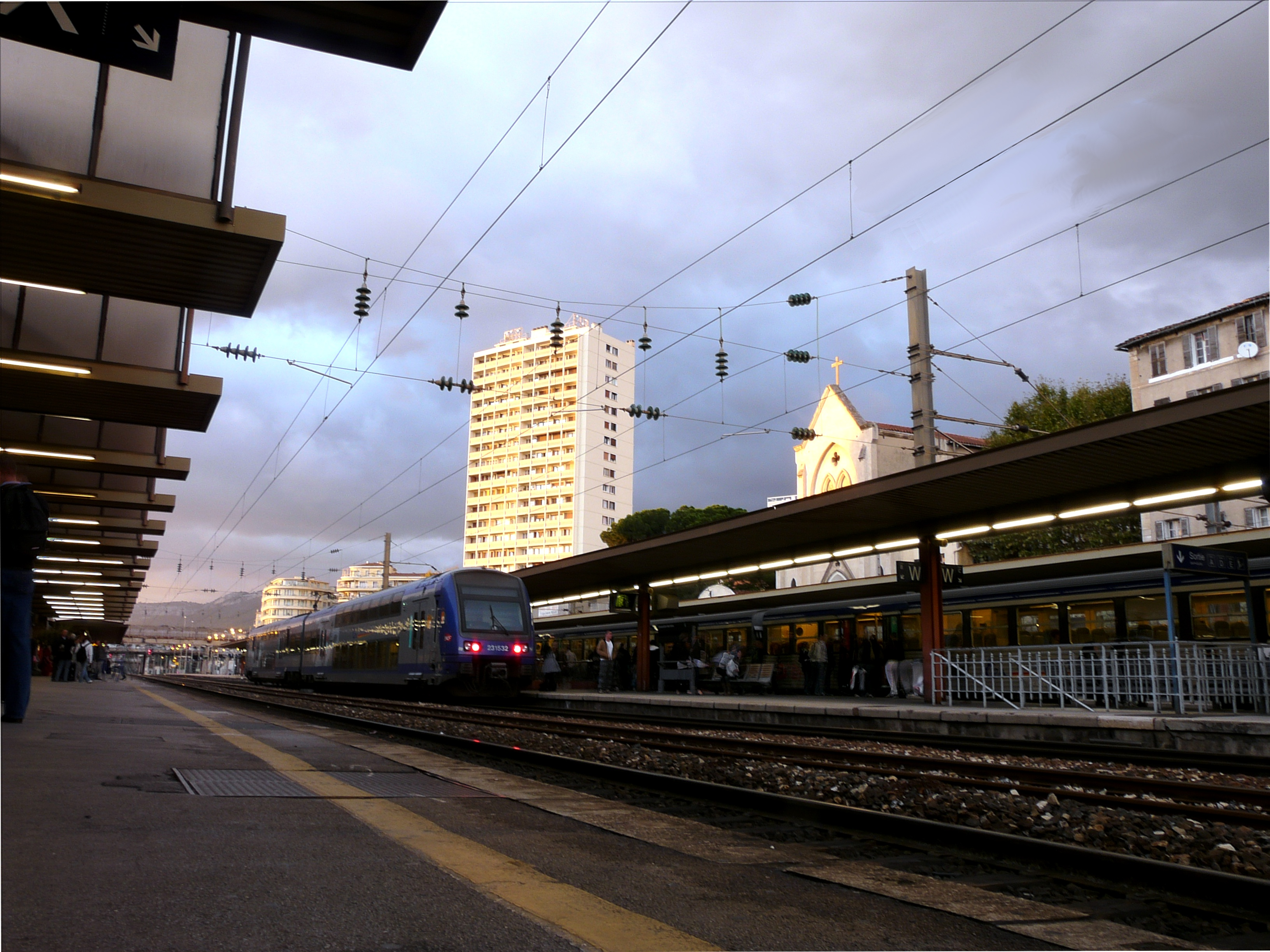 La gare de Toulon.